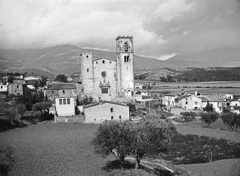 Imatge